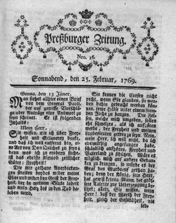 Titulný list bratislavského Pressburger Zeitung z r. 1796.